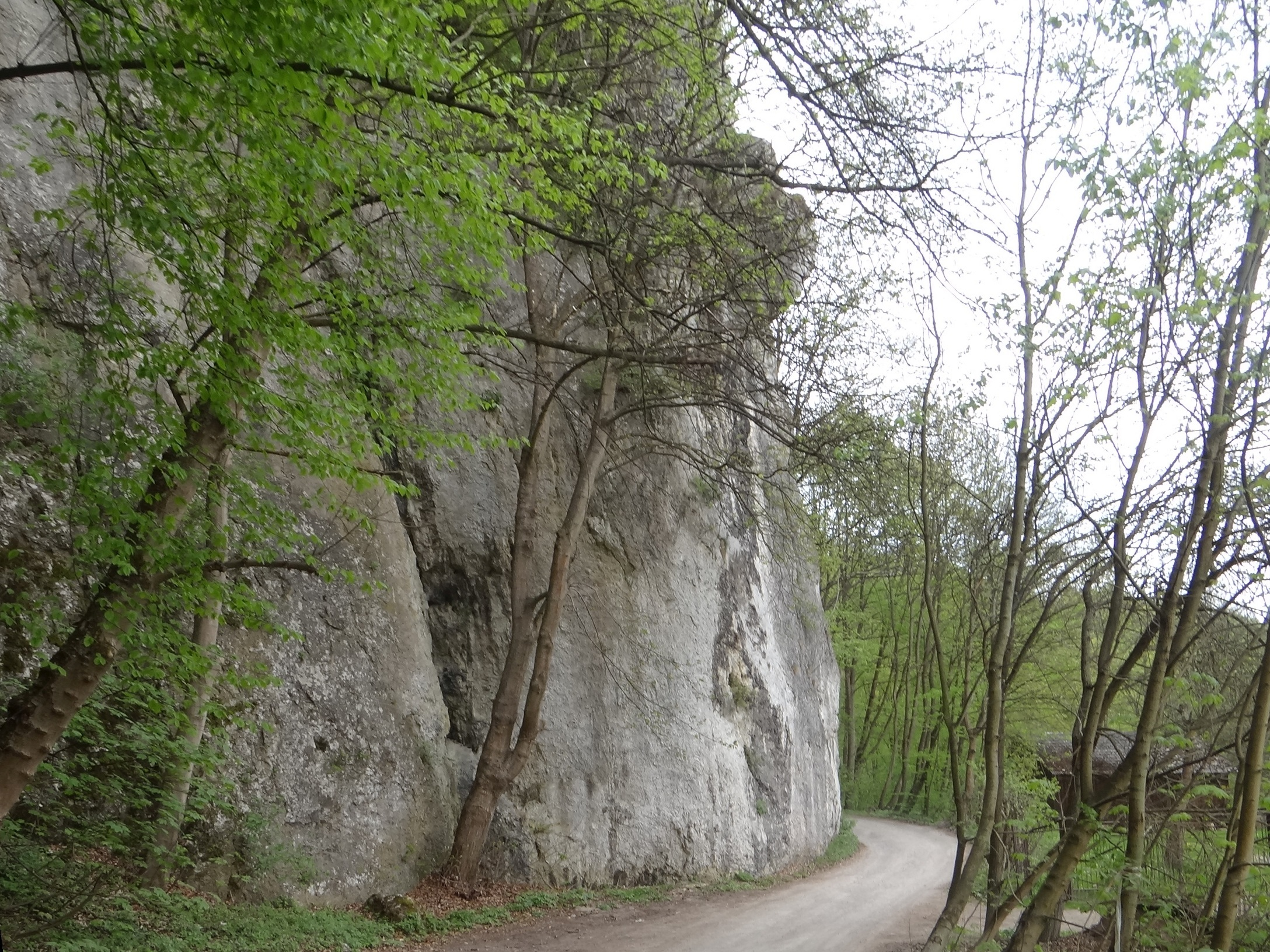 Skała Golanka w Ojcowskim Parku Narodowym